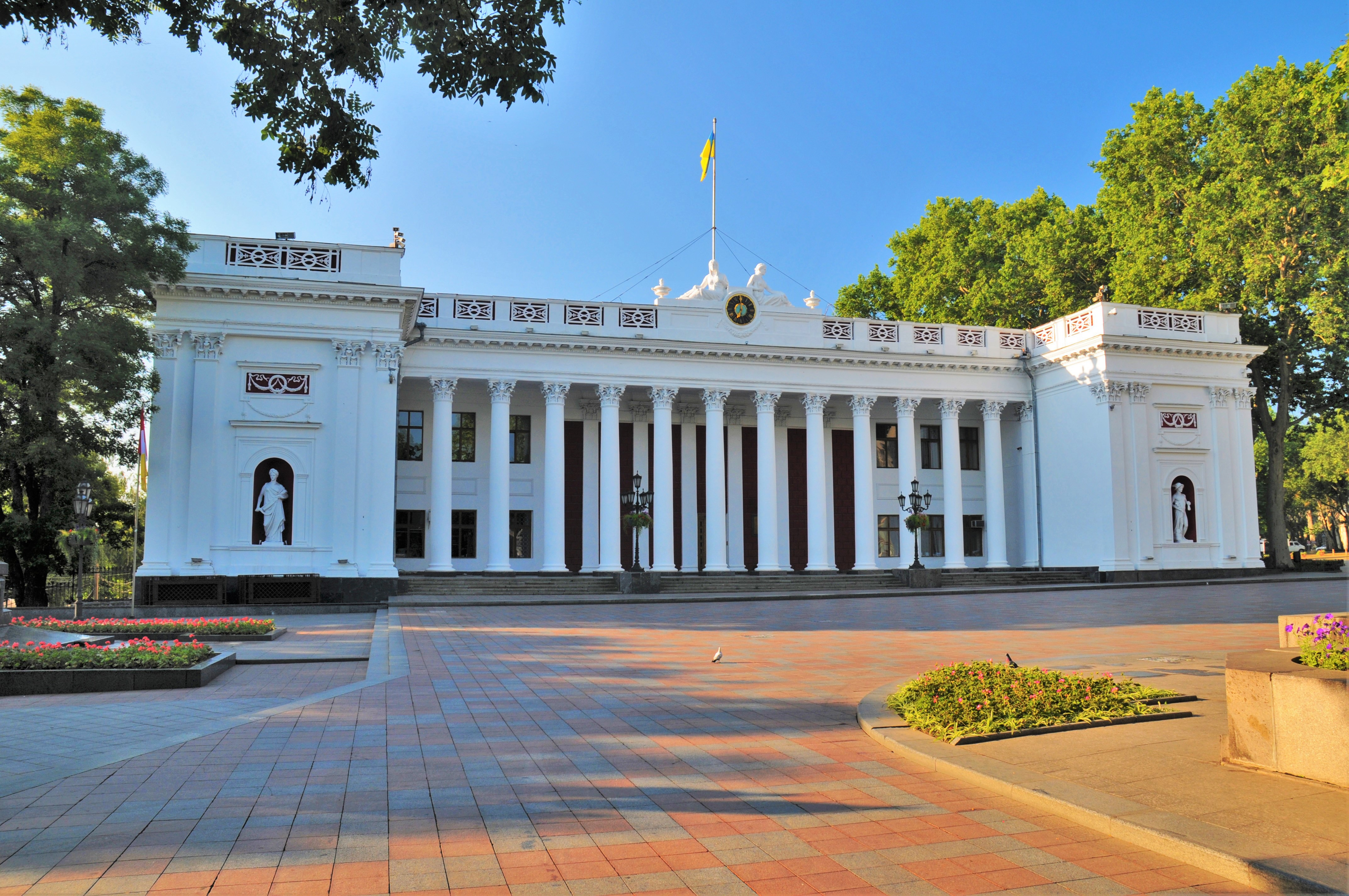 Одеса, Дума